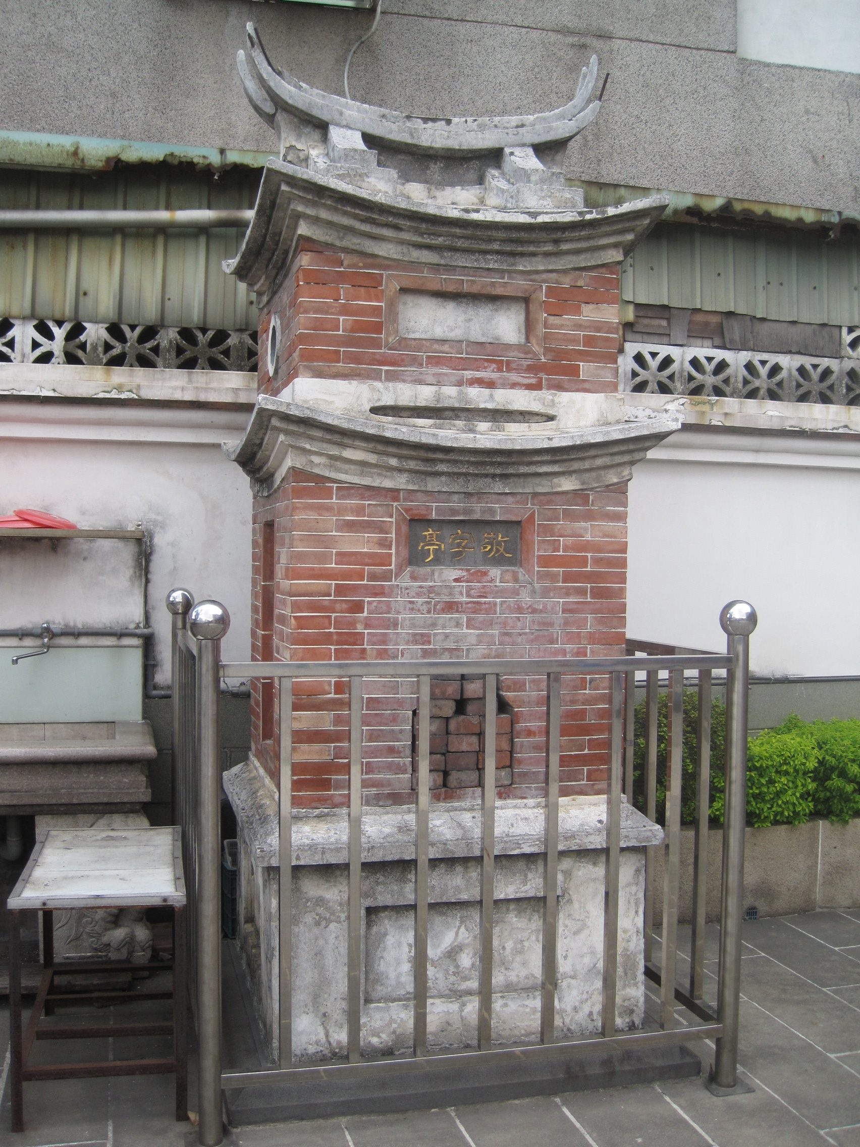 新莊文昌祠敬字亭